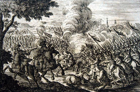 Kopparstick över slaget vid Hummelshof 1702, gjord 1733